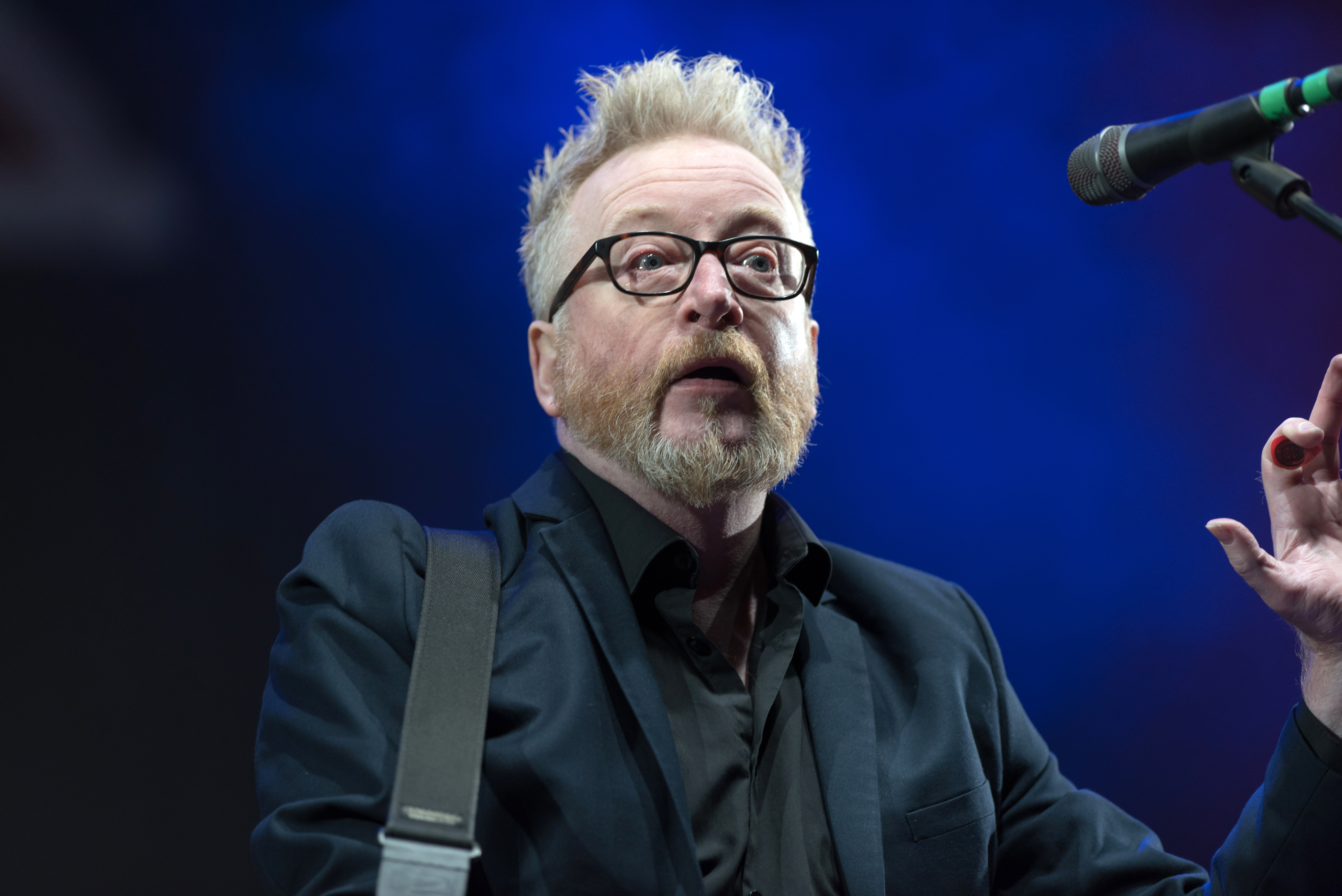 Flogging Molly live beim Reload Festival 2018